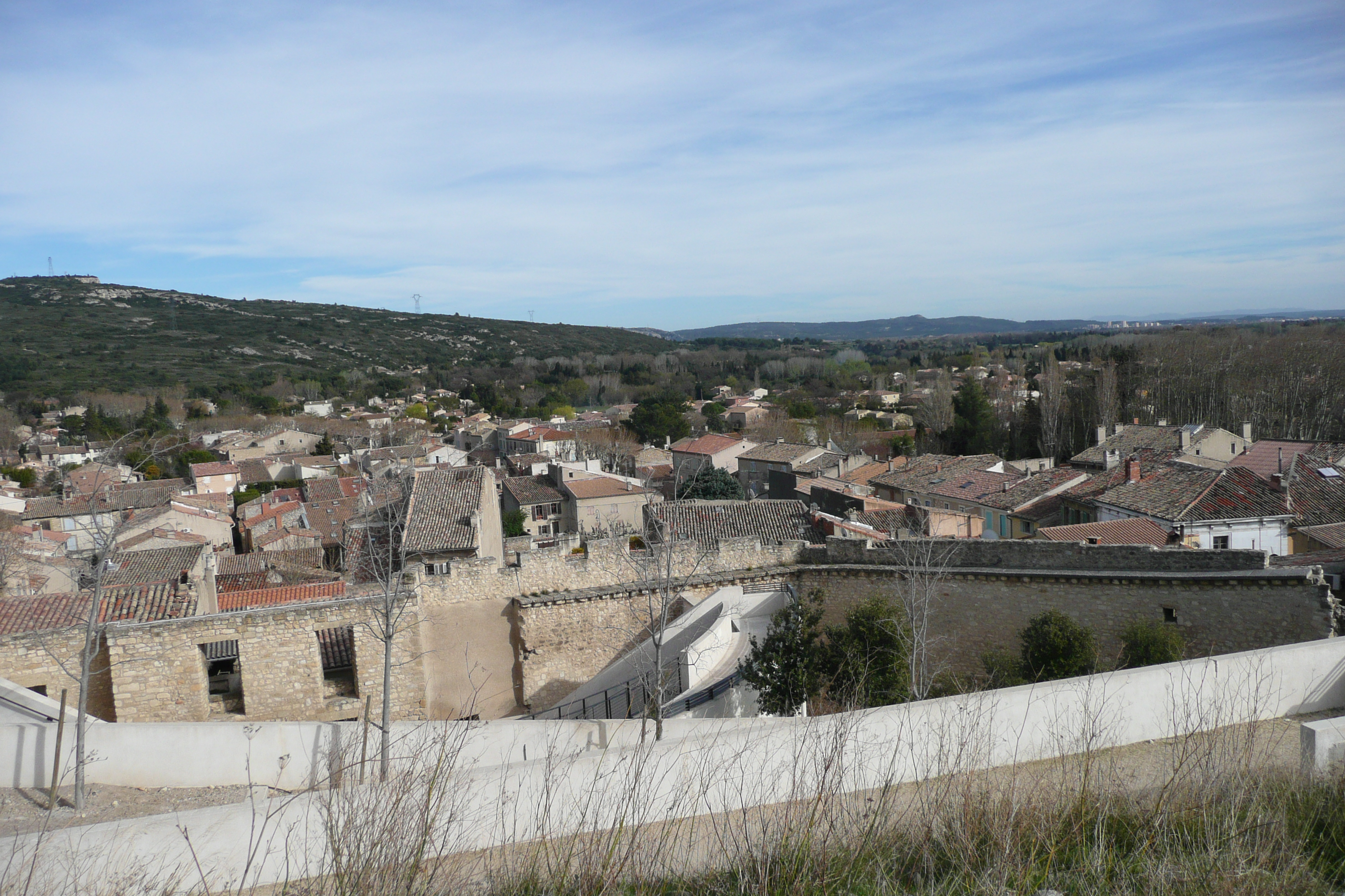 Vue sur Eyguières.